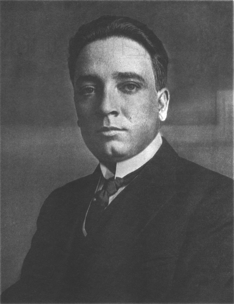 Retrato de Baltasar Brum (1883 - 1933), presidente del Uruguay.